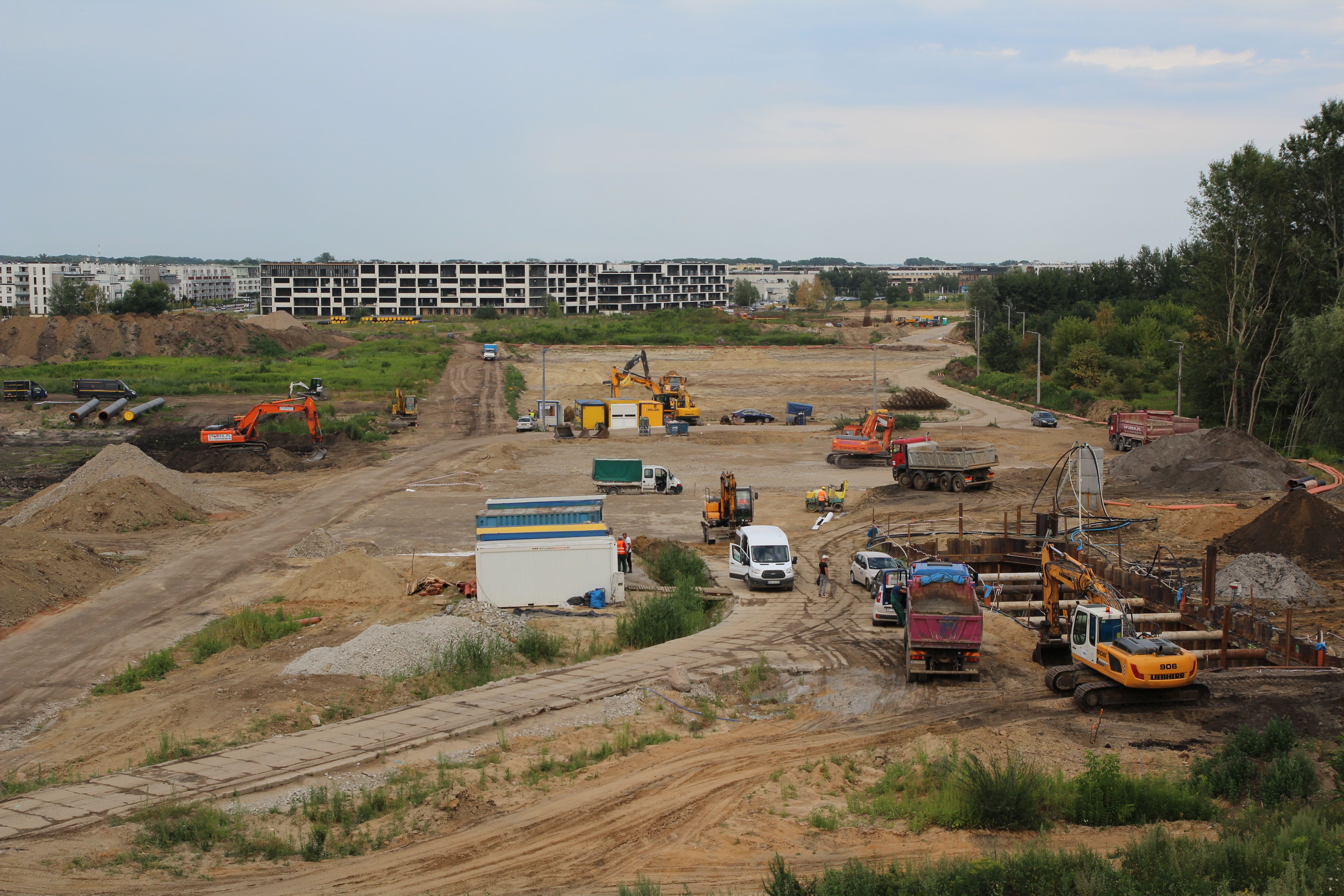 Plaskowickiej-Miasteczko, construction site S2, Warsaw, 11.07.2018